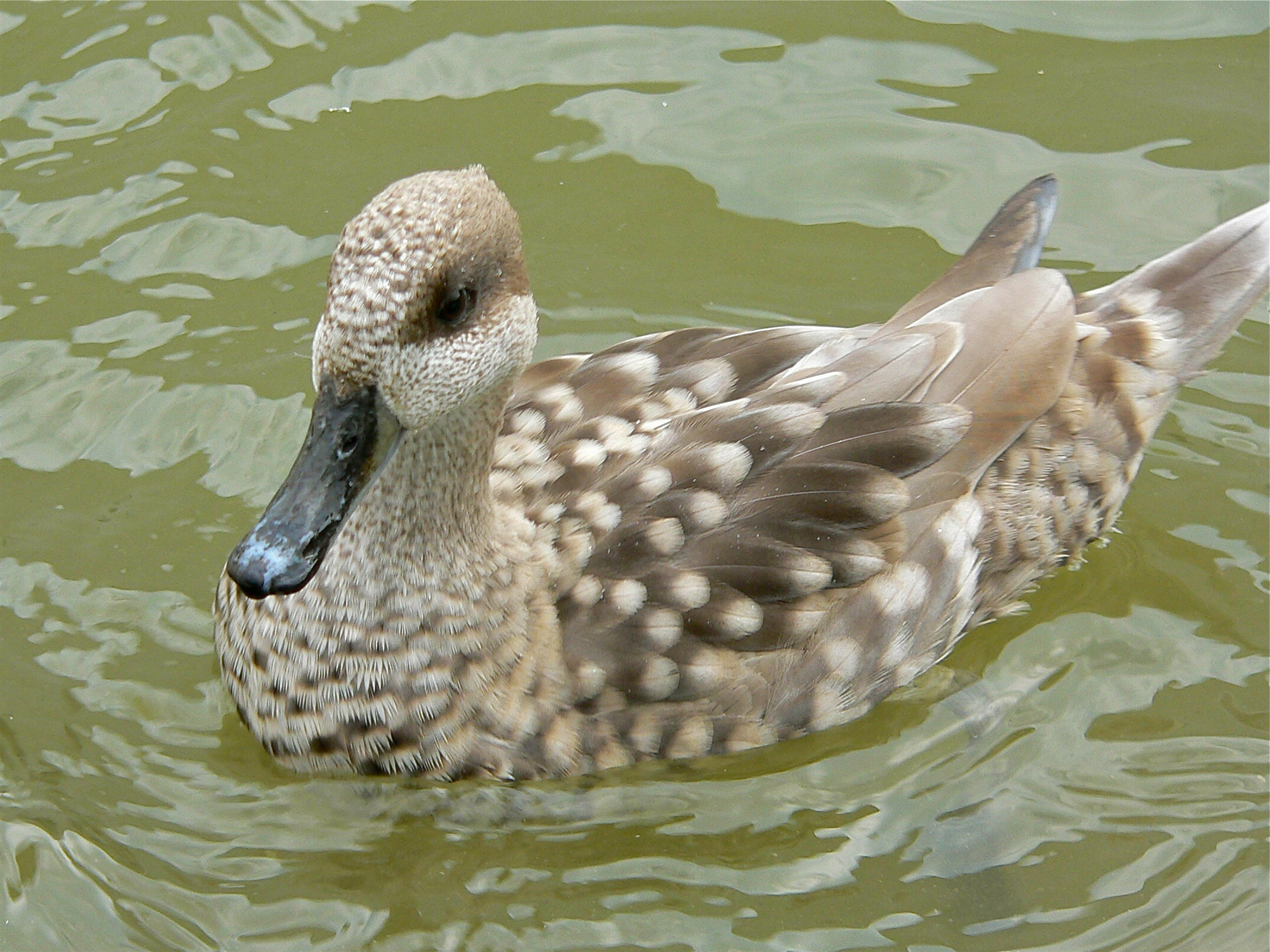 Parc Phoenix, Nice, Alpes-Maritimes, FRANCE